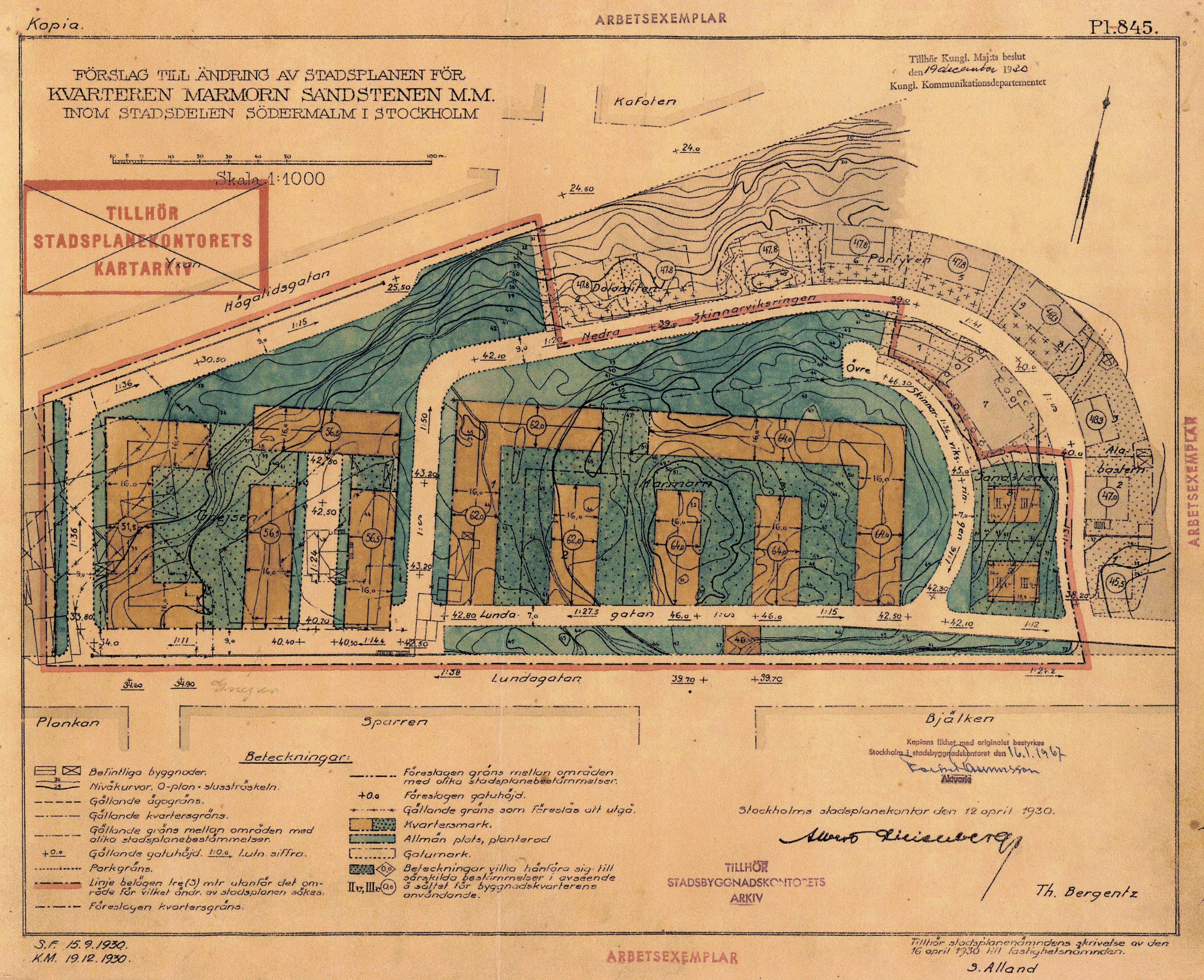 Stadsplan för Skinnarviksringen i Stockholm